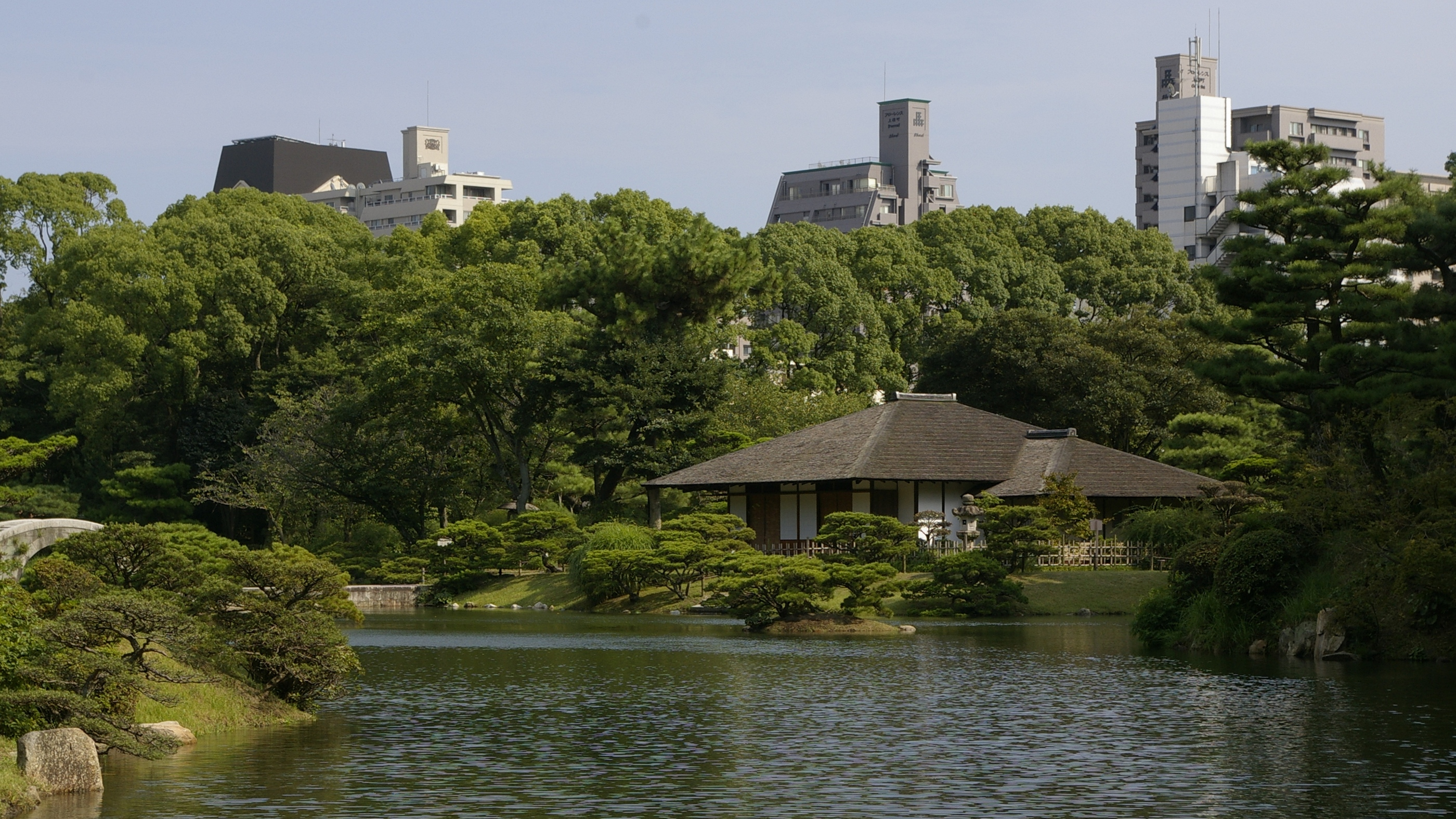 Seifukan im Shukkei-en in Hiroshima